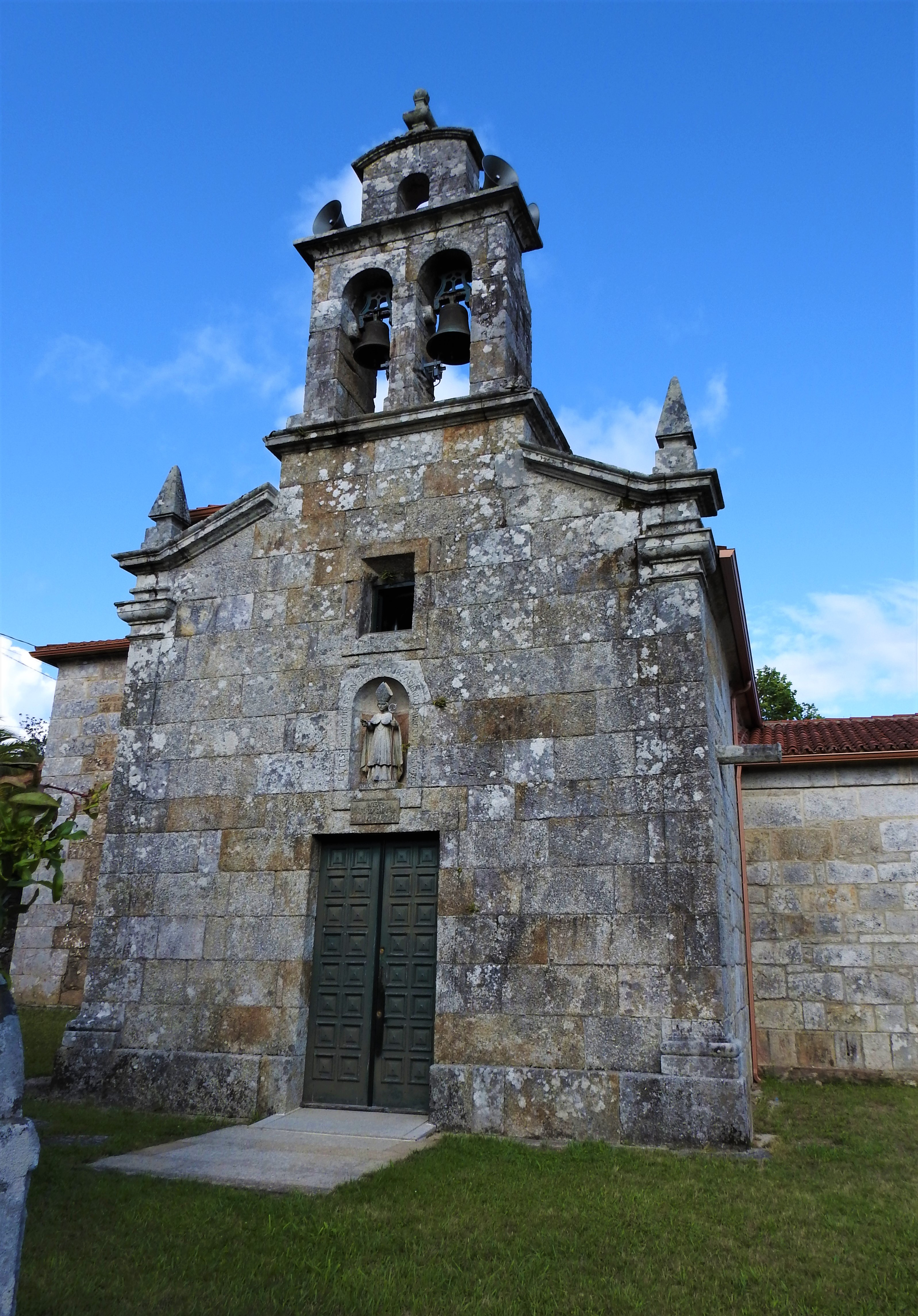 Iglesia parroquial de Fruíme, no concello Coruñes de Lousame.